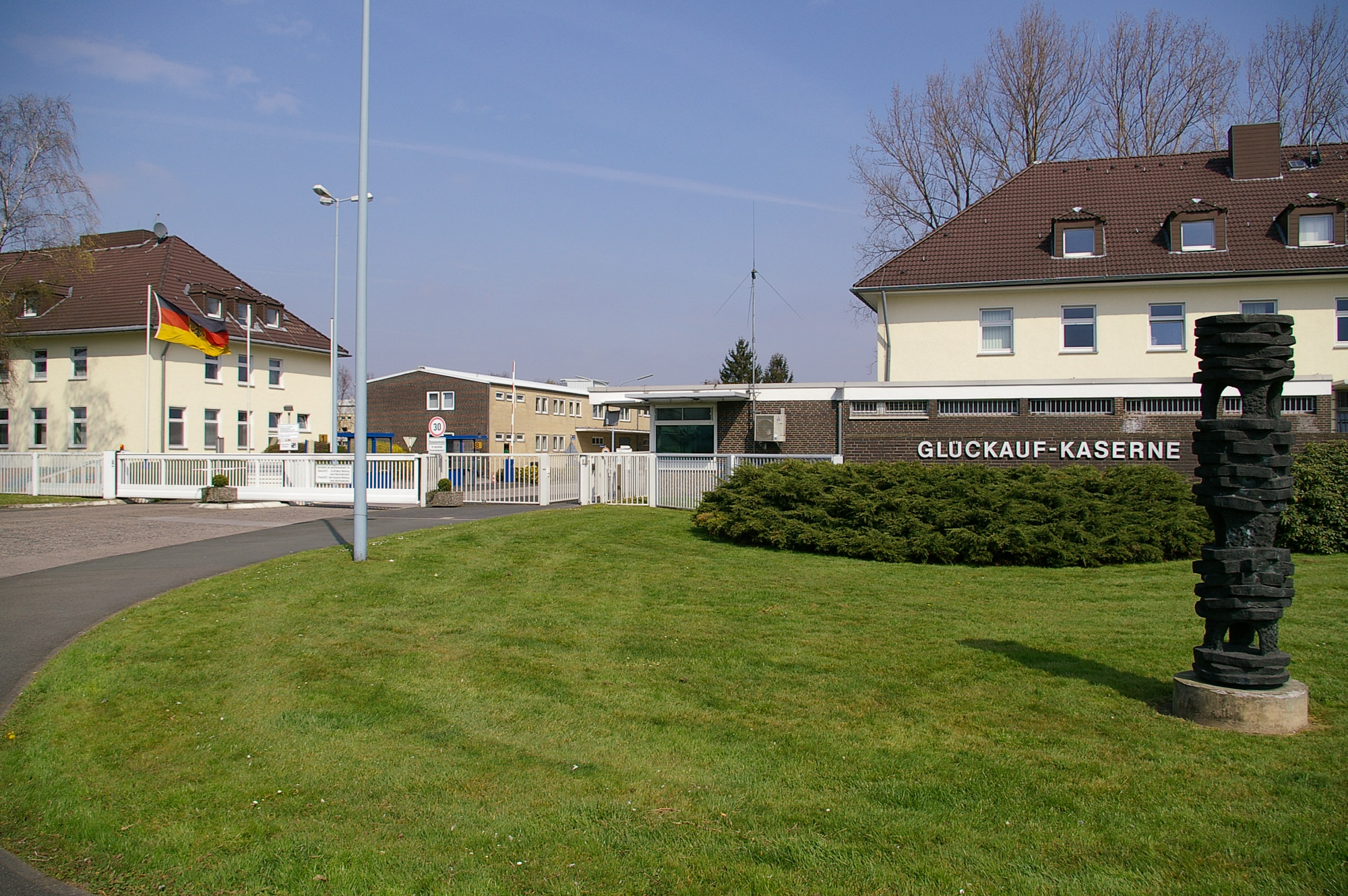 Unna, Glückauf-Kaserne, Standort des Instandsetzungsbataillons 7 der deutschen Bundeswehr